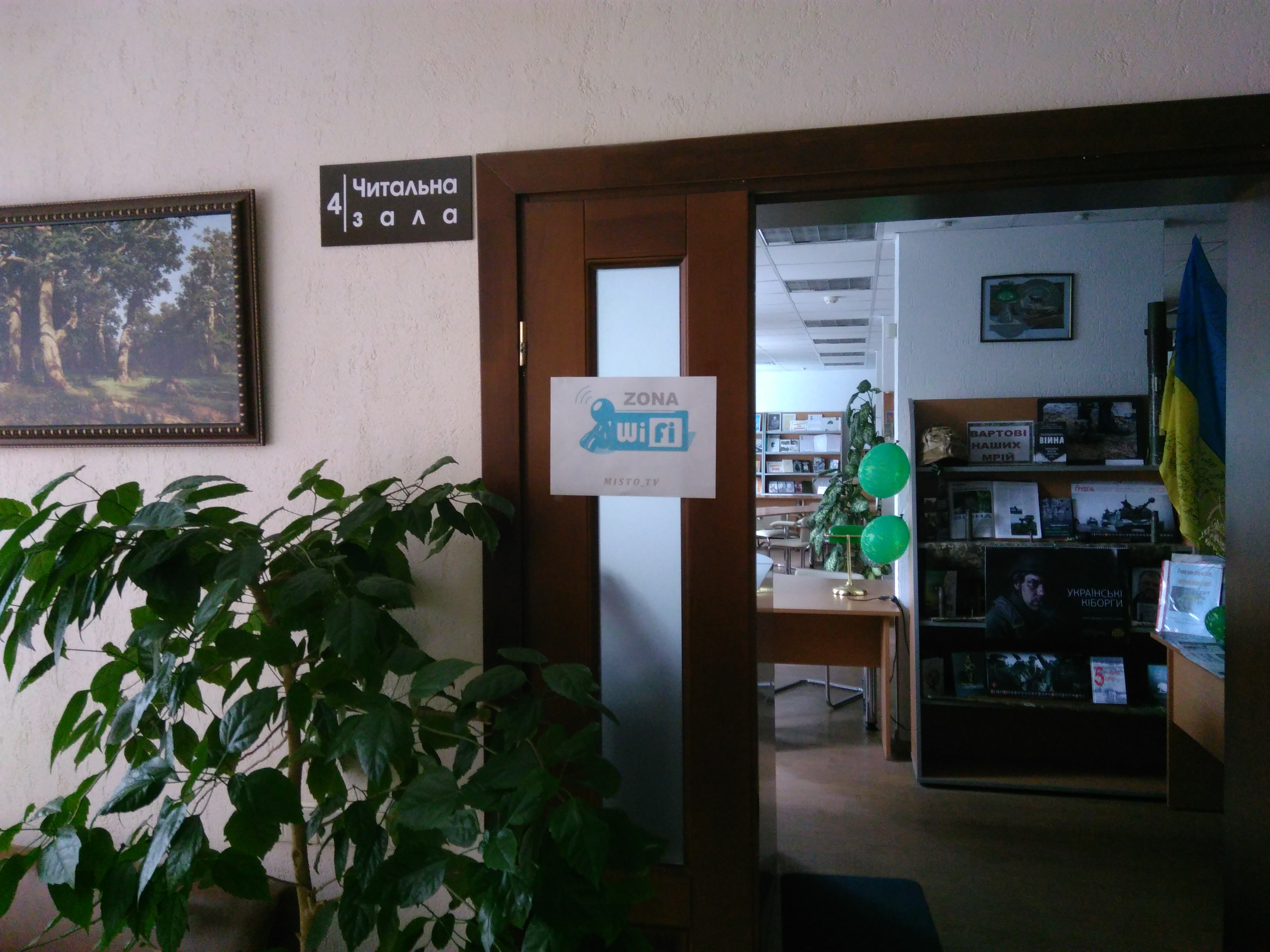 Бібліотека Достоєвського в Києві